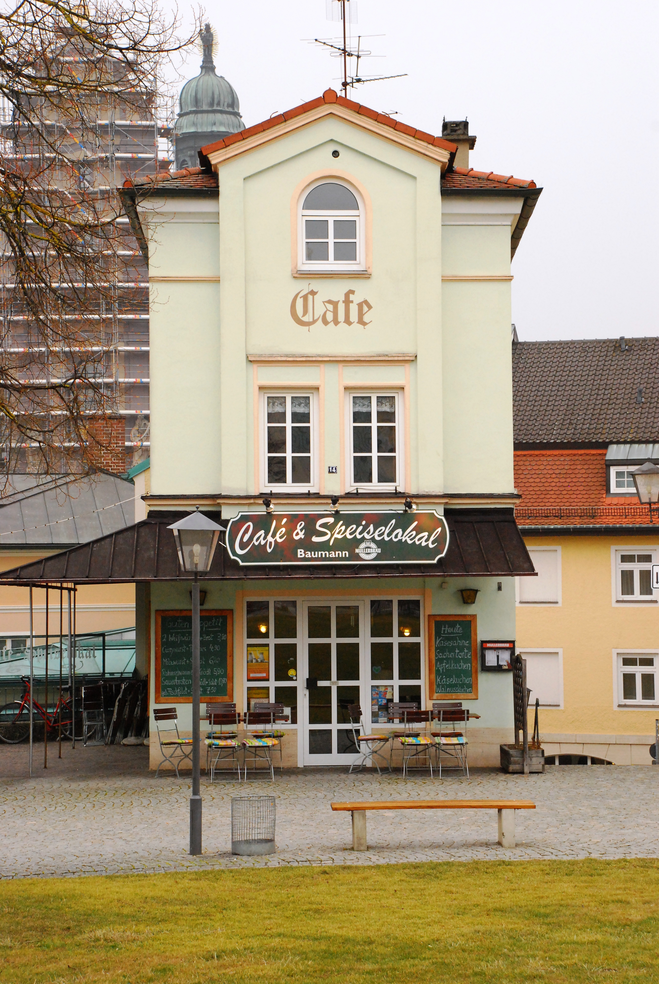 Cafehaus am Kapellplatz 14 in Altötting, Landkreis Altötting, Regierungsbezirk Oberbayern, Bayern. Als Baudenkmal unter Aktennummer D-1-71-111-22 in der Bayerischen Denkmalliste aufgeführt.